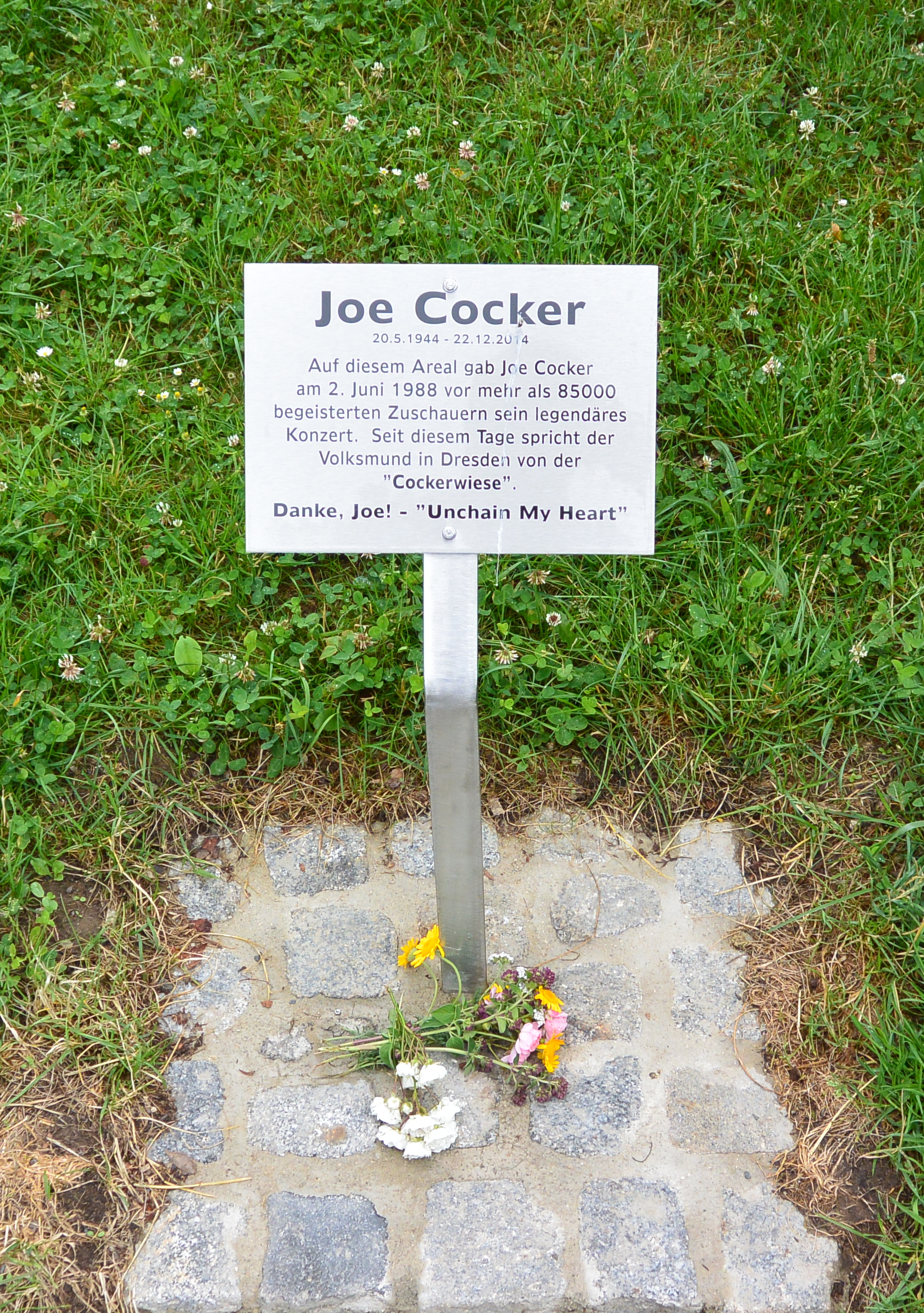 Am 20. Mai 2015, dem 71. Geburtstag Joe Cockers, wurde diese Gedenktafel postum aufgestellt. Inschrift: Joe Cocker 20.5.1944 – 22.12.2014 Auf diesem Areal gab Joe Cocker am 2. Juni 1988 vor mehr als 85000 begeisterten Zuschauern sein legendäres Konzert. Seit diesem Tage spricht der Volksmund in Dresden von der “Cockerwiese”. Danke, Joe! – “Unchain My Heart”